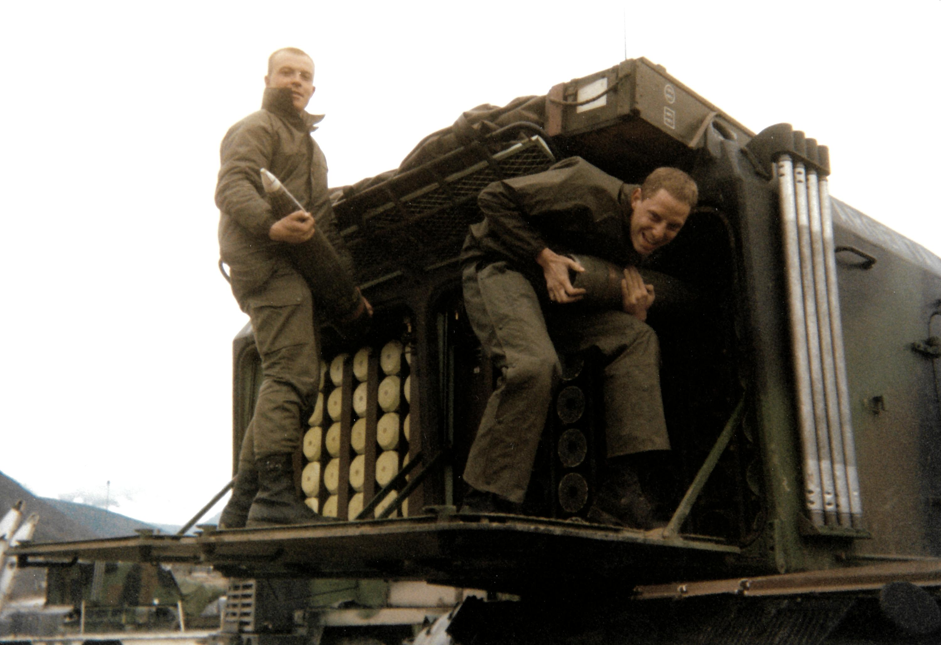 Le première classe Bouchet et moi même rangeons les obus. Chaque obus pèse 42 kg. on remarquera que les charges qui propulsent les obus sont rangées de l'autre coté du char, coté artificier.